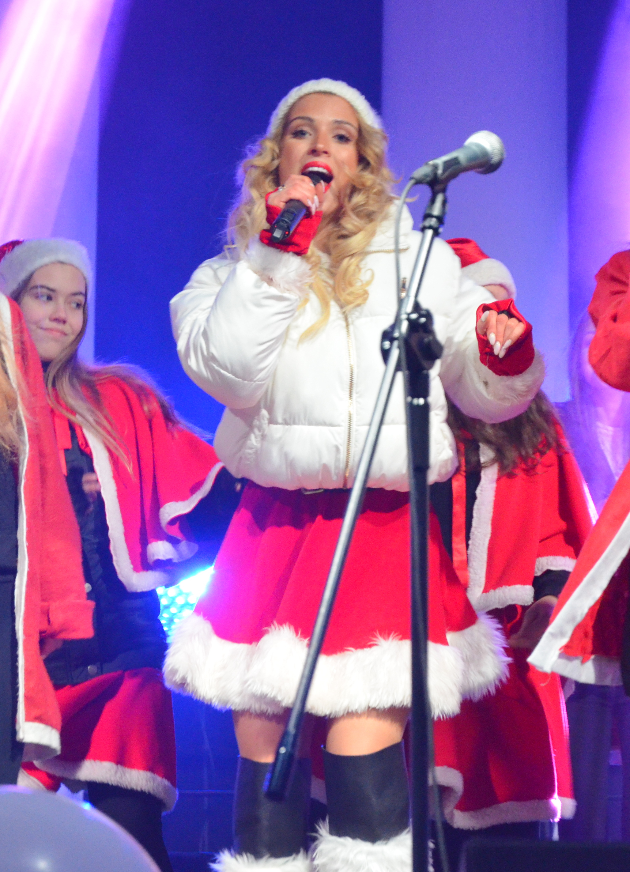 Aneta Sablik, Bielitzer Weihnachtsmarkt 2016